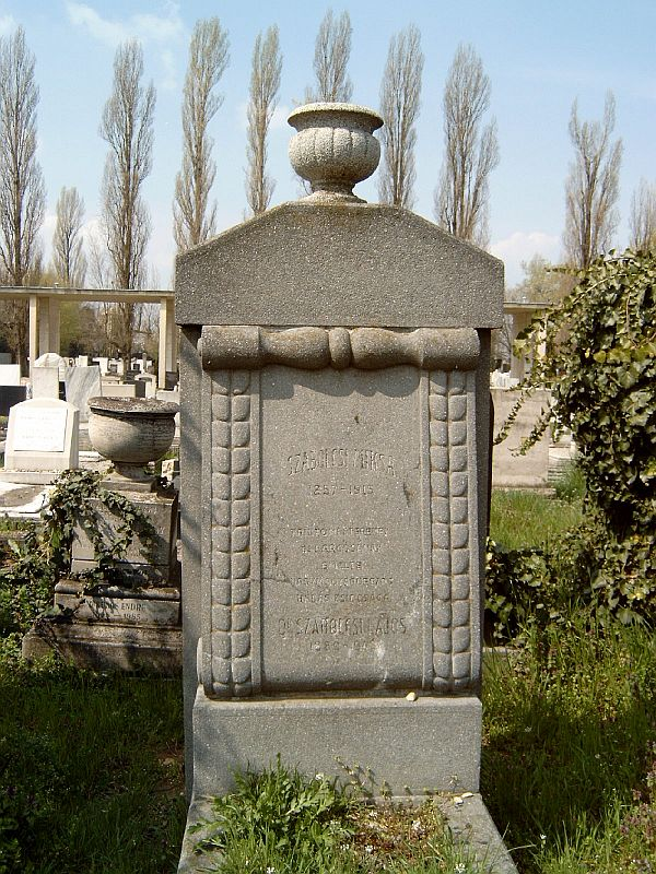 Szabolcsi Lajos (Bp., 1889. okt. 17. – Bp., 1943. nov. 11.) író, újságíró és Szabolcsi Miksa (Tura, 1857. aug. 17. – Balatonfüred, 1915. jún. 17.) újságíró sírja Budapesten. Kozma utcai izraelita temető: 5B-11-20.